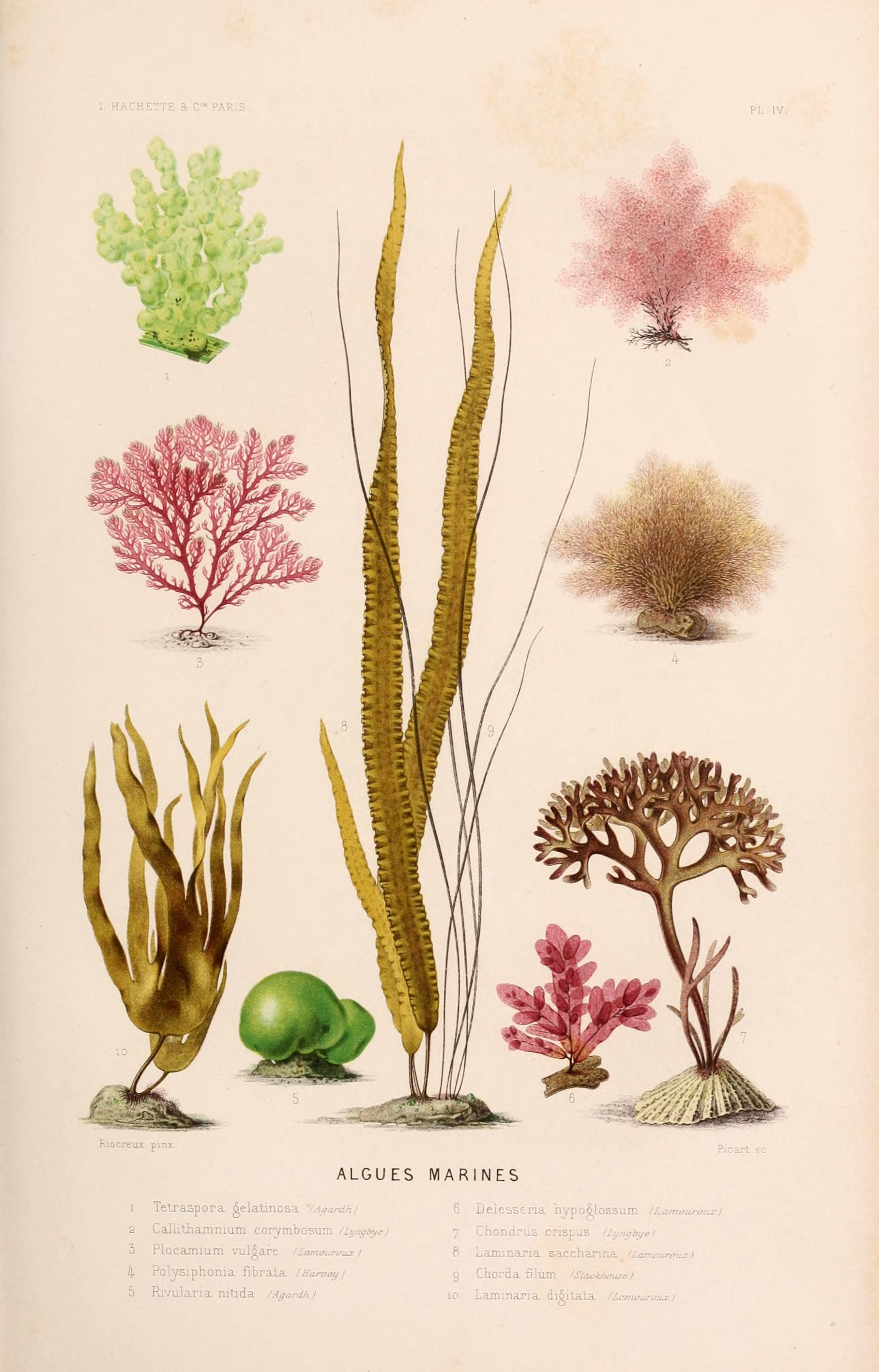 ALGUES MARINES , , , , , , Chondrus crispus, Laminaria saccharina, Chorda filum, Laminaria digitata. 1 Tetraspora gelatinosa 2 Callithamnium corymbosum 3 Plocamium vulgaire 4 Polysiphonia fibrata 5 Rivularia nitida 6 Delesseria hypoglossum 7 Chondrus crispus 6 Laminaria saccharina 9 Chorda filum 10 Laminaria digitata